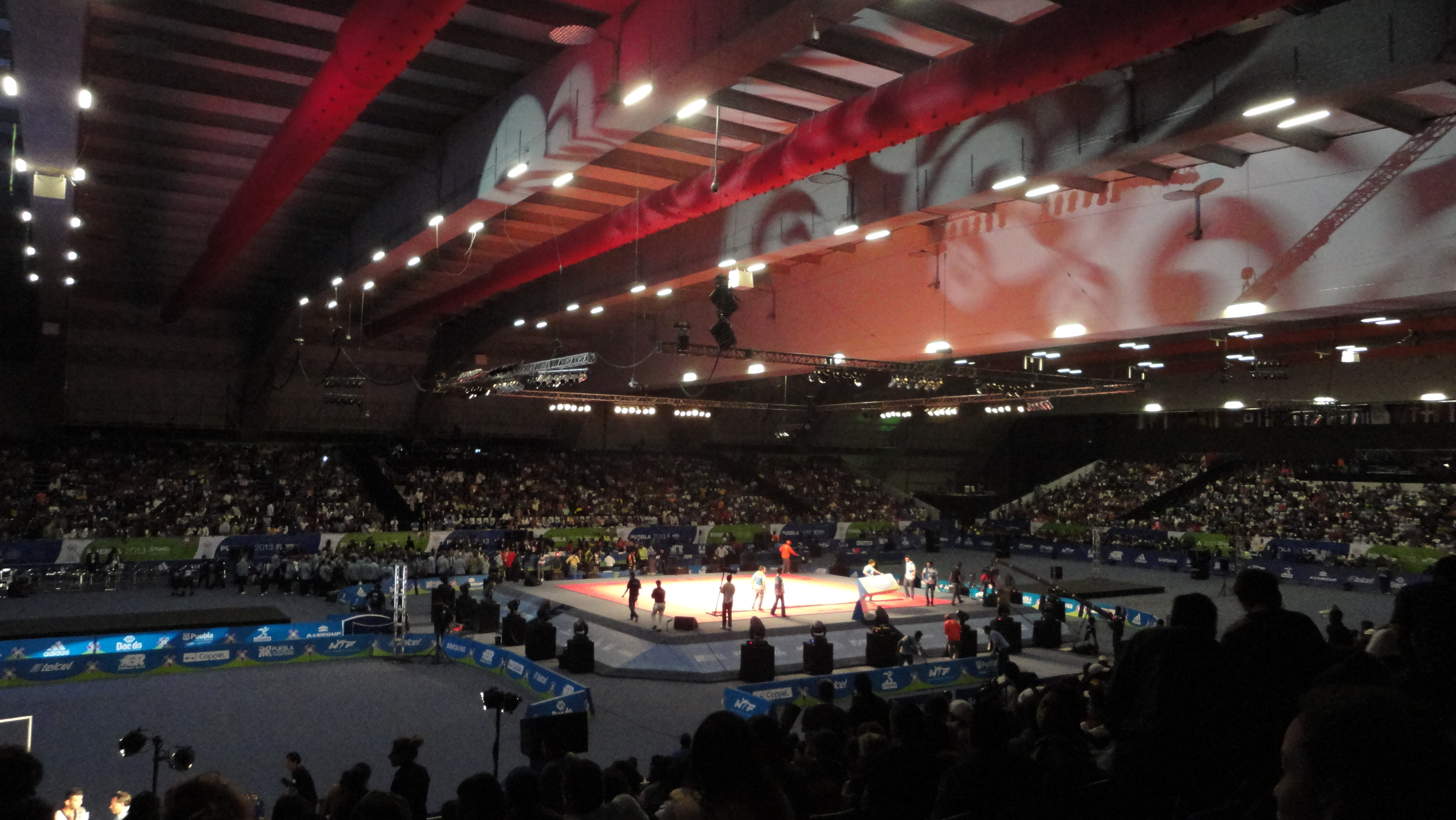 Lleno total durante la final del campeonato Puebla 2013